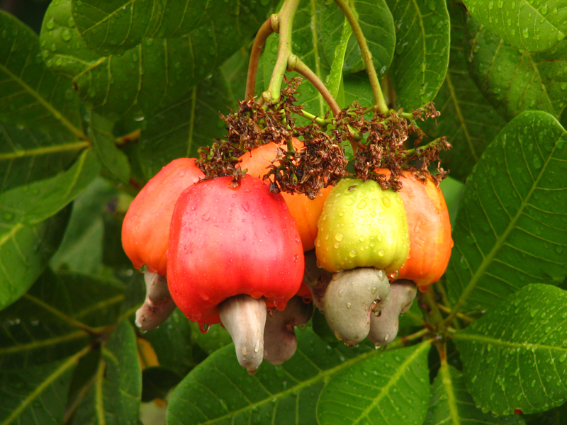 Marañón